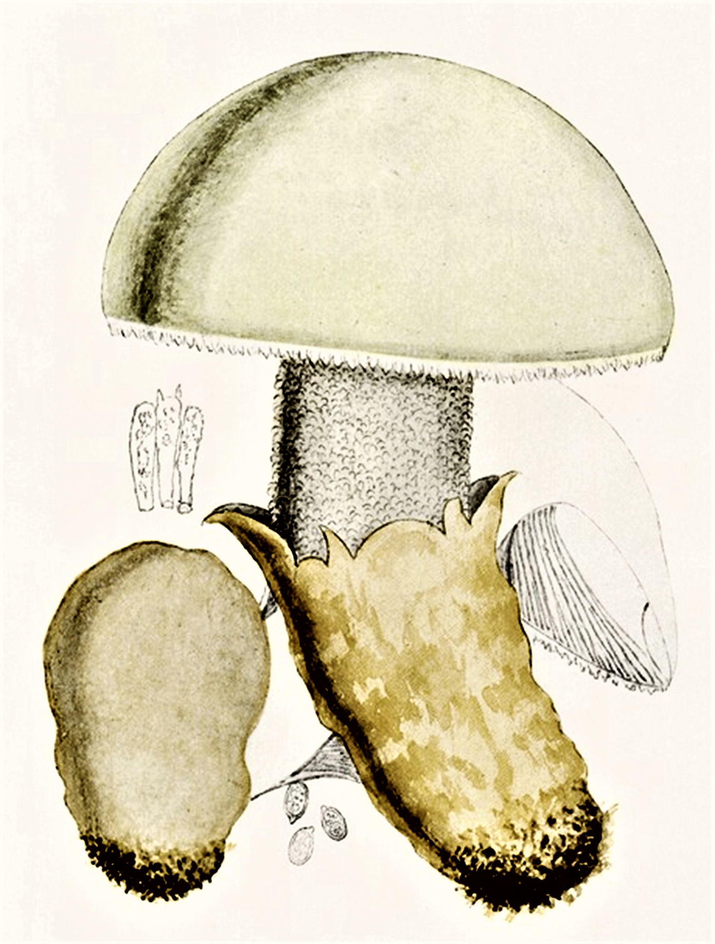 Giacomo Bresadola: Amanita ovoidea (Bull.,1788) Link (1833)